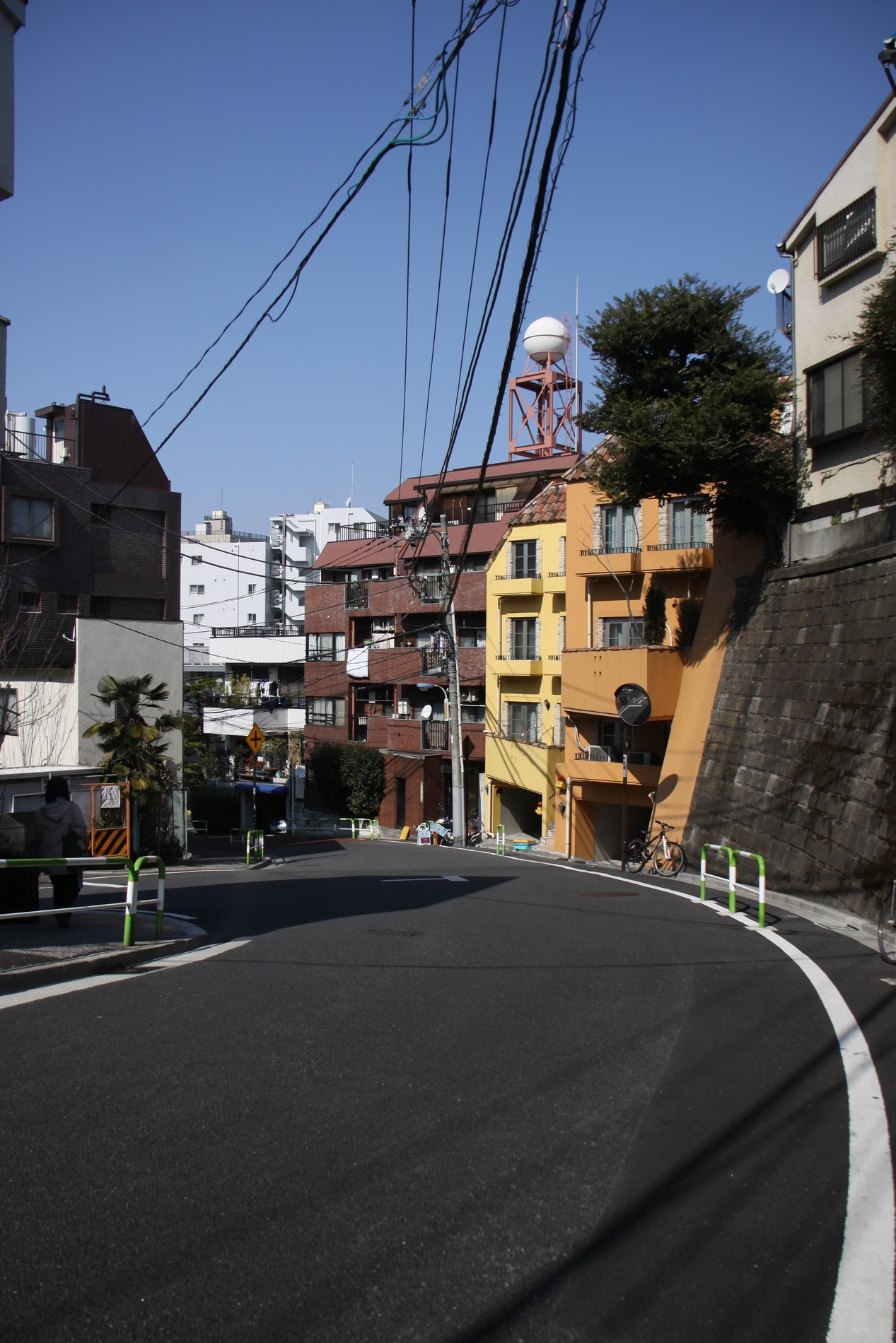 新坂 (文京区西片)。